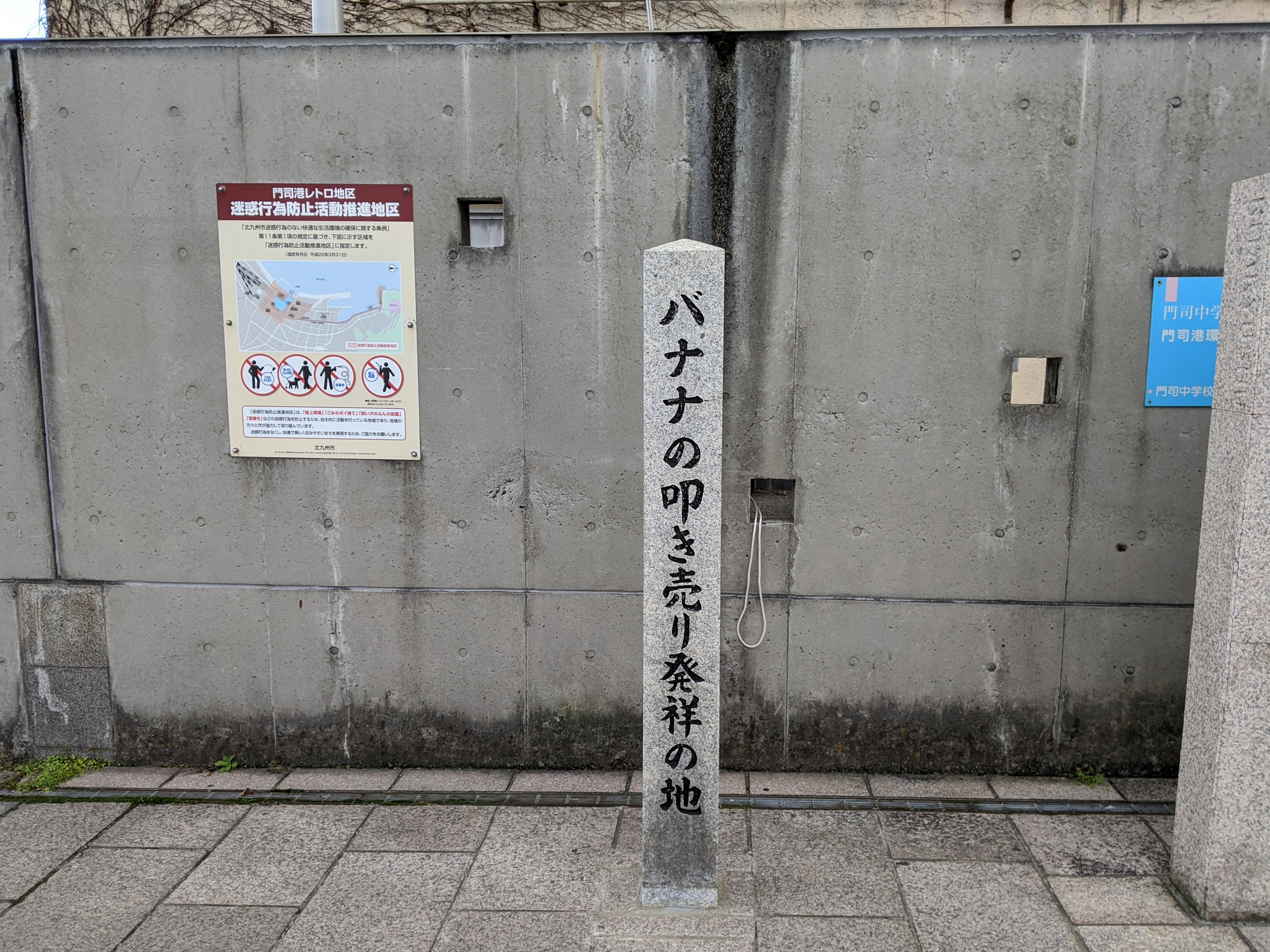 「バナナの叩き売り発祥の地」碑。門司港駅前に移設されたもの（北九州市門司区）。